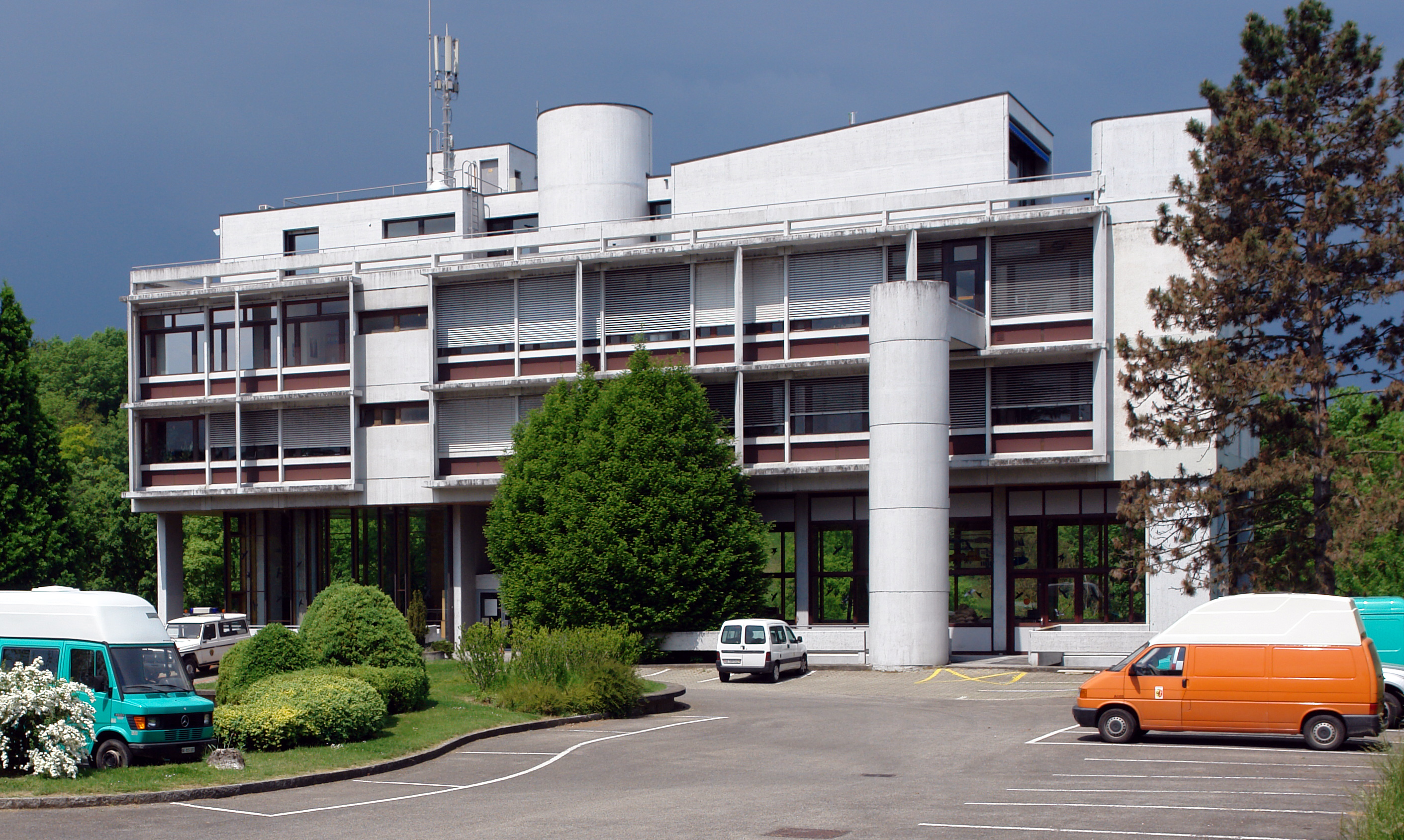 Sewage plant, Vernier, 1964-67 in Switzerland, Architect: Georges Brera, Administration